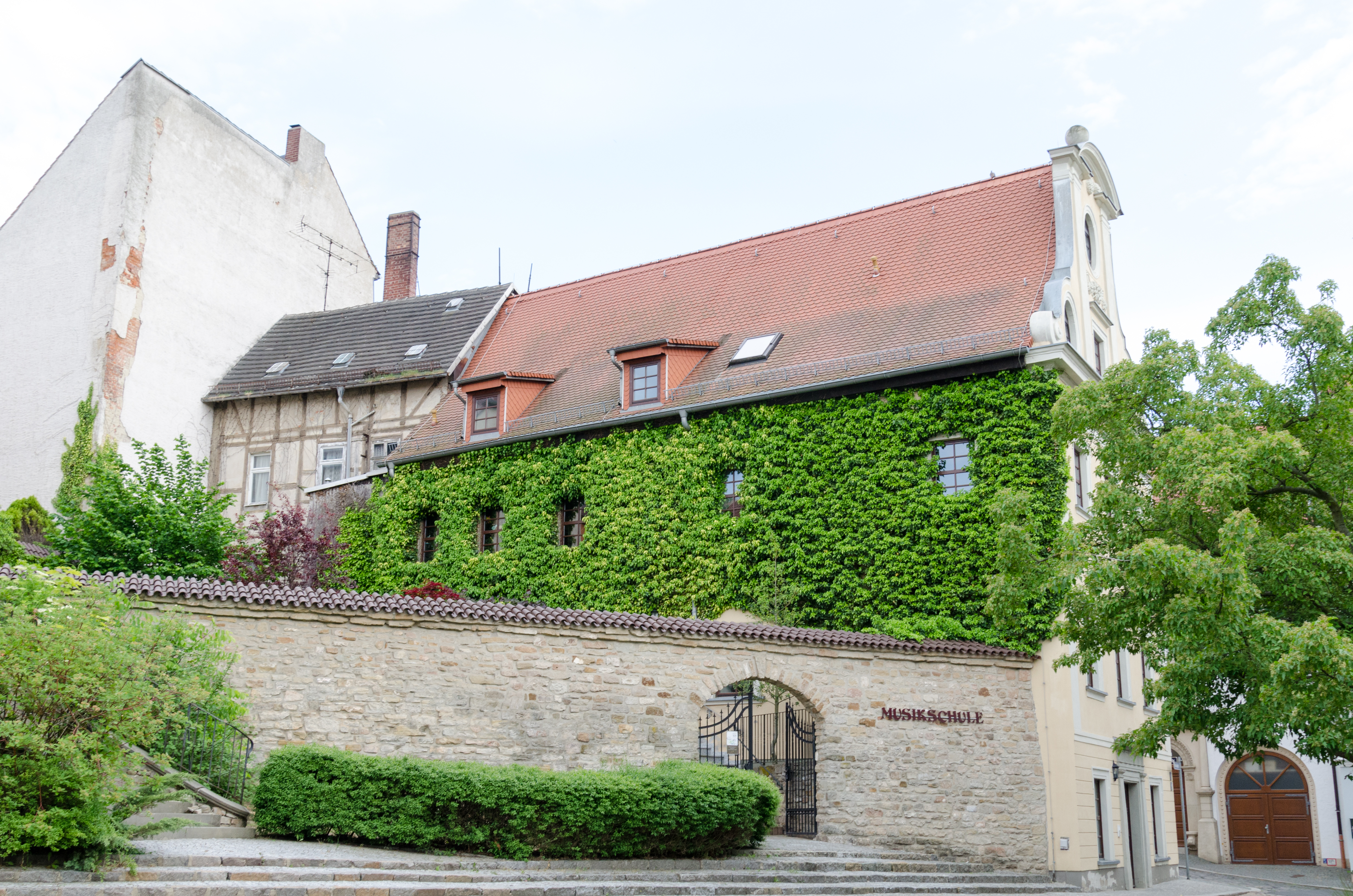 Zeitz, Nicolaiplatz 1